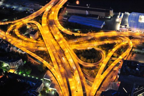 LUDWIGSHAFEN am Rhein 05.05.2011 Nachtluftbild vom Verlauf der B 44 an der Rampe zur Kurt-Schumacher-Brücke am Ludwigshafener Rheinufer.